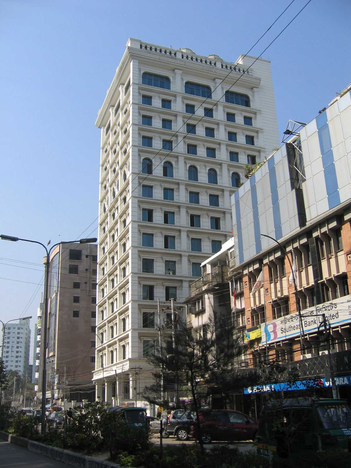 Janakantha Bhaban, headquarter of Globe Janakantha Shilpa Paribar, at New Eskaton, Dhaka, Bangladesh.